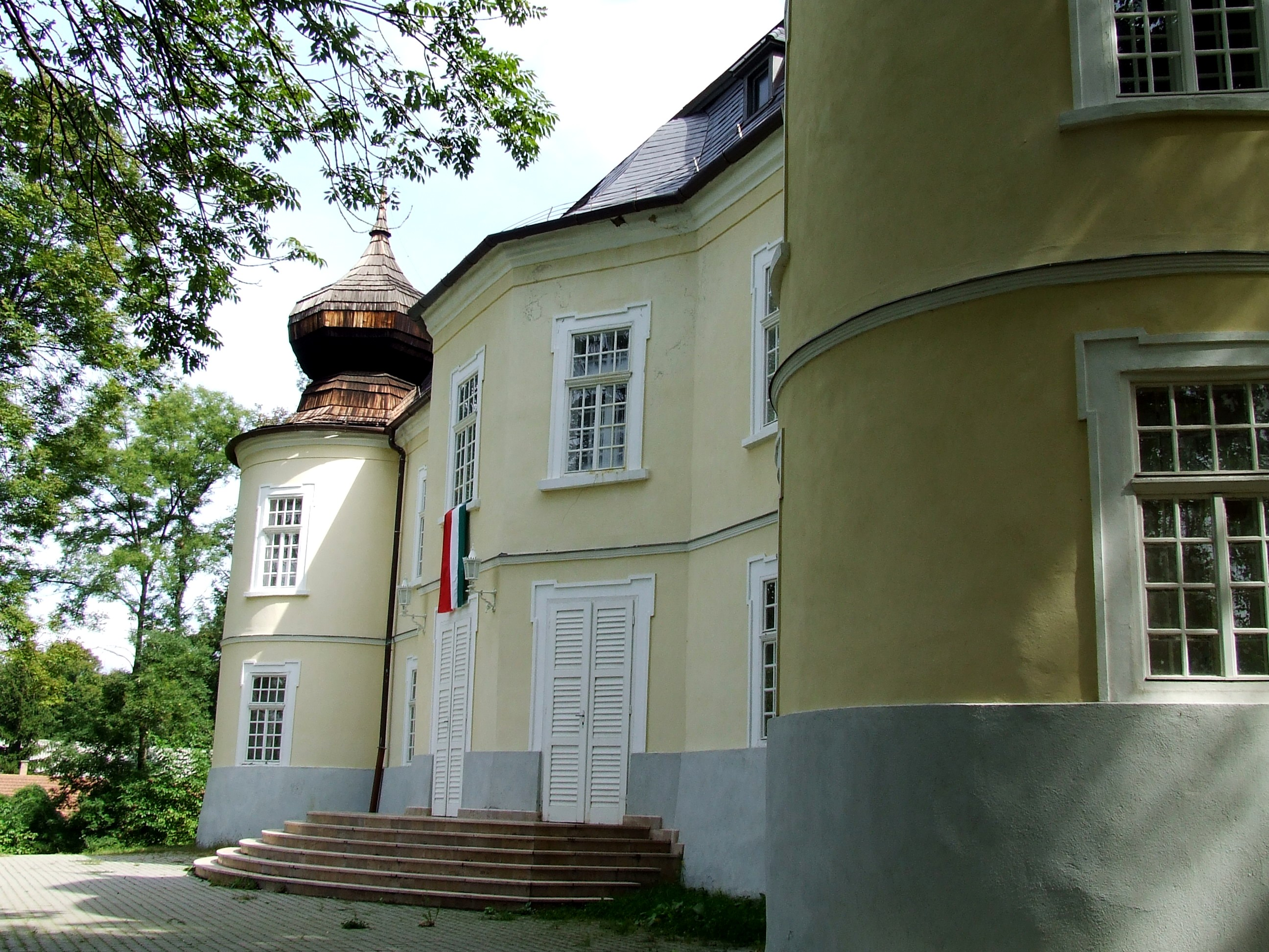 Gyürky-Solymossy-kastély, Kisterenye